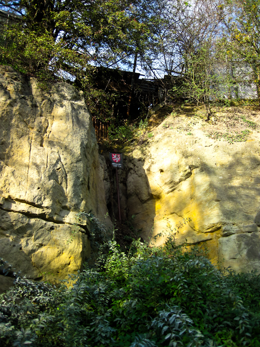 Prochazka v PP Prosecke skaly. Fotografie jsou urceny k ilustraci clanku o teto Prirodni pamatce.